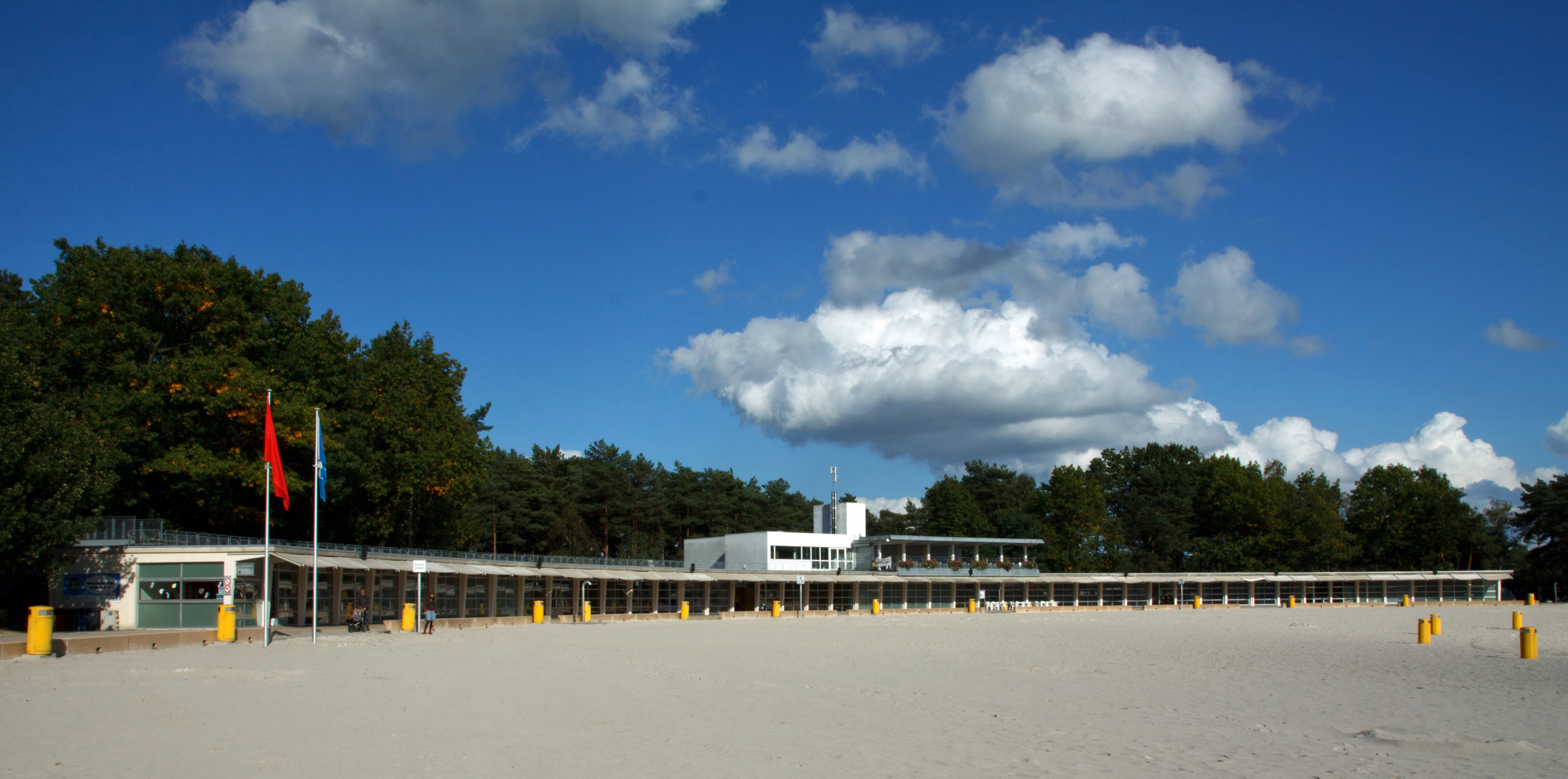 Strandgebouw op het Provinciaal domein Zilvermeer te Mol.